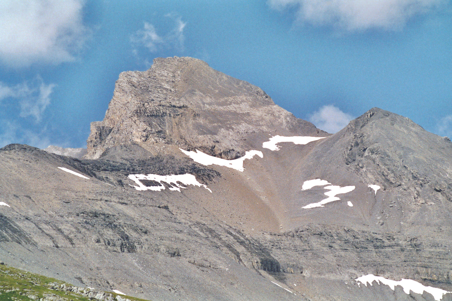 Photo de la haute cime, plus haute dent des Dents du Midi.